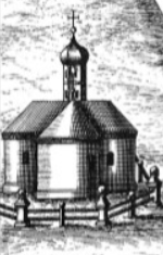 Stich von Michael Wening: Augustiner-Chorherrenstift Schlehdorf